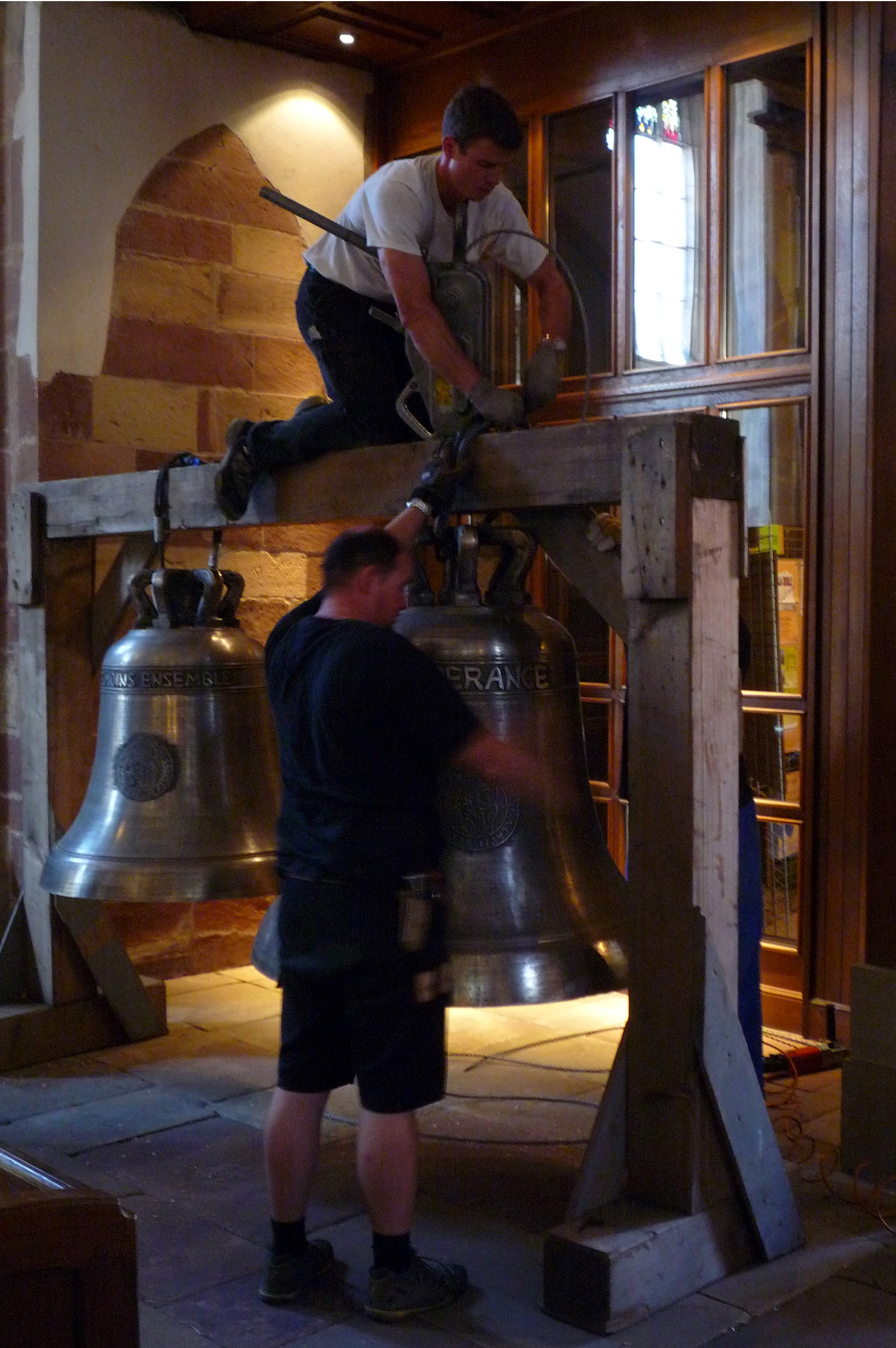 Saint Thomas installation des cloches le 27 juillet 2009